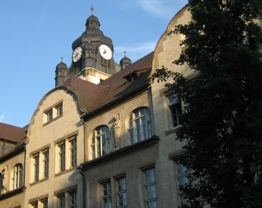 UHGJena